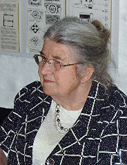 Jeanne Müller-Quévy